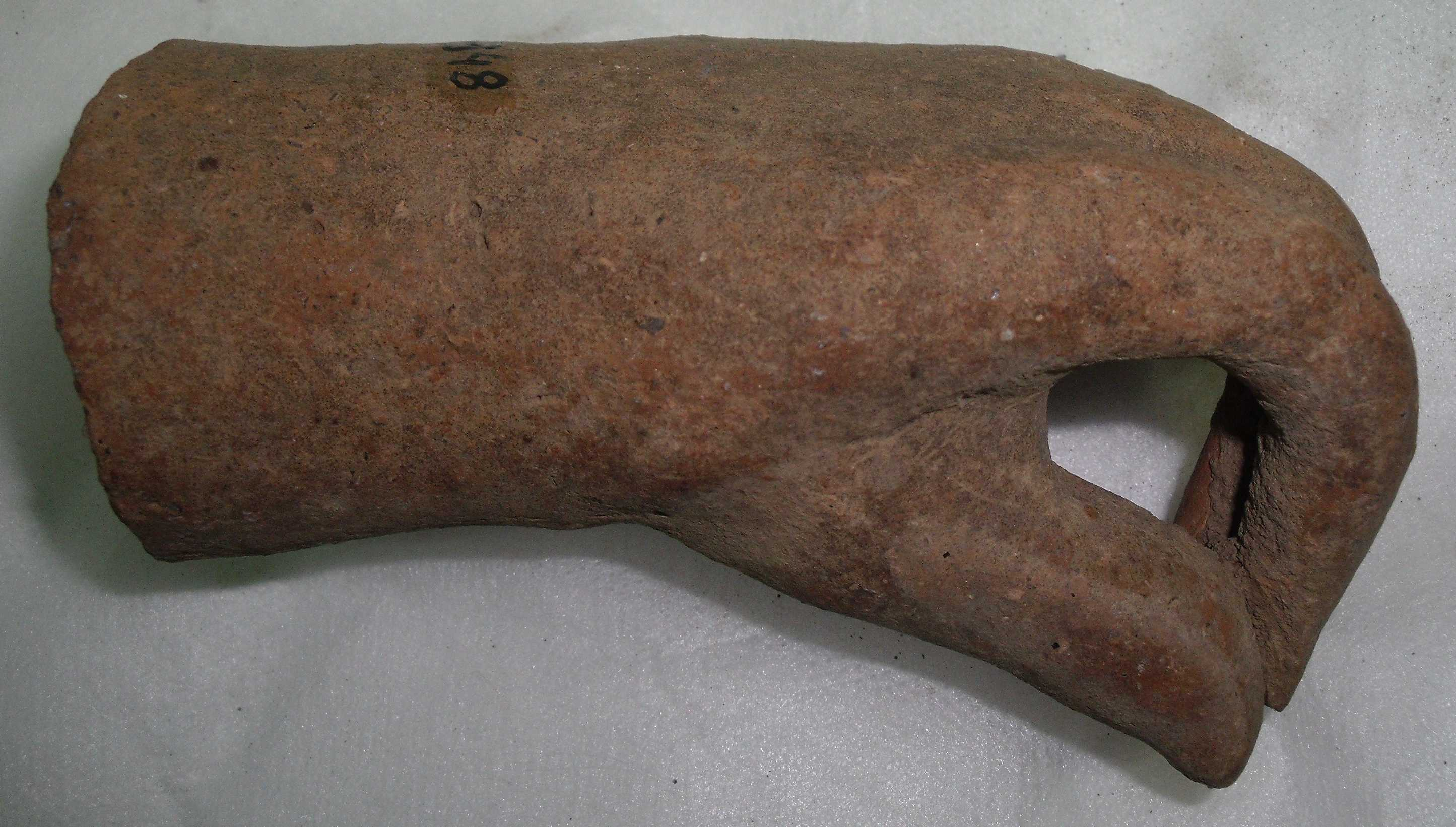 Mà, vista de costat, amb vel, amb els dits polze e índex ajuntats. Època hel·lenística del segle IV-II aC.